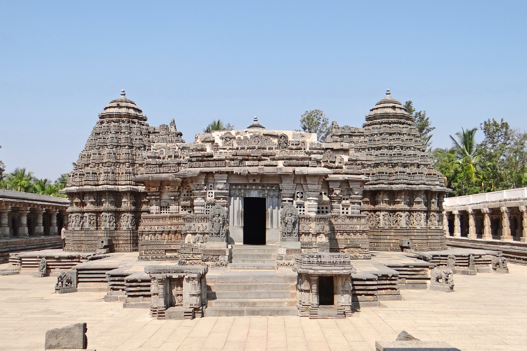 Vue d'ensemble du temple de Chennakesava (ou Chennakeshava) à Somnathpur (ou Somanathapura) L'édification de ce temple de style Hoysala date de 1269. C'est Somanatha, un des généraux du roi hoysala Narashimha III (1254-1291) qui en est le commanditaire initial. C'est l'un des plus beaux temples indiens de la période médiévale. L'état de conservation de la structure et des décors est remarquable. Ce temple est composé de trois sanctuaires dédiés à Vishnou (Kesava, Venugopala, Janardhana), surmontés chacun d'un sikhara et reliés entre eux. Il est construit sur une plateforme en étoile et entouré d'une enceinte à galerie comprenant 64 chapelles secondaires. Les murs extérieurs et intérieurs ainsi que les colonnes sont très richement décorés de reliefs sculptés. Les sculpteurs ont pour la plupart signé leurs oeuvres. Sites de référence